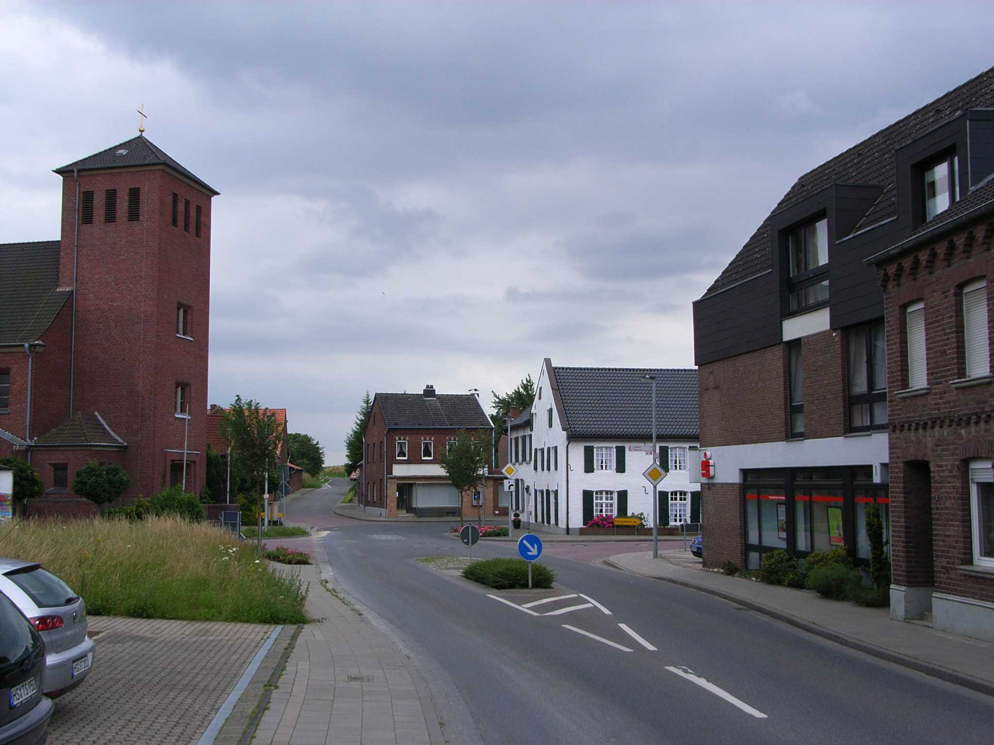 Ortszentrum Erkelenz-Golkrath